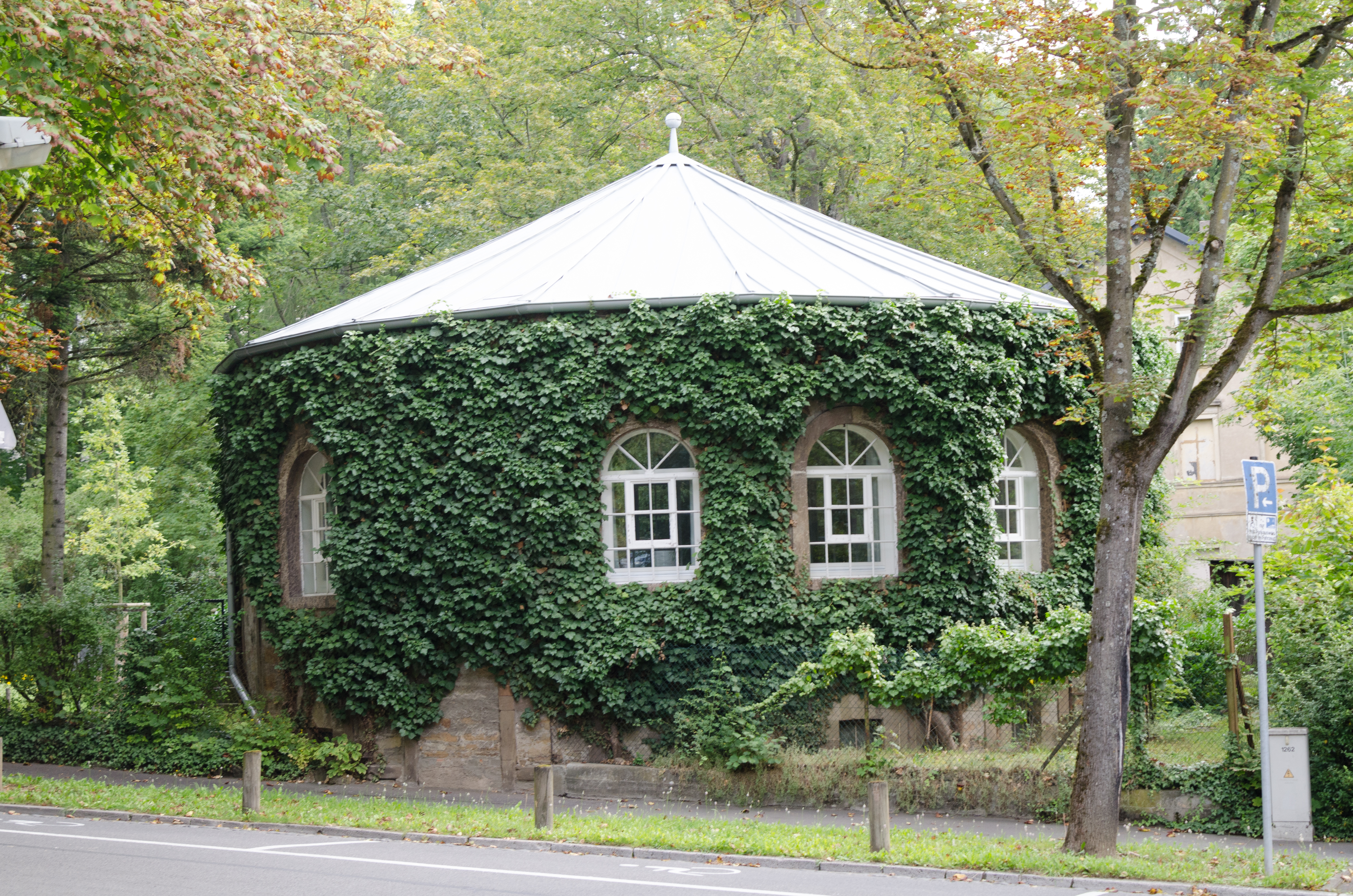 Schweinfurt, Söldnerstraße 6